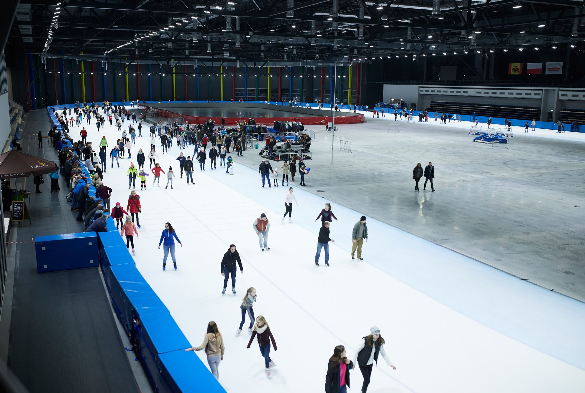 Ferie 2018 w Arenie Lodowej Tomaszów Mazowiecki